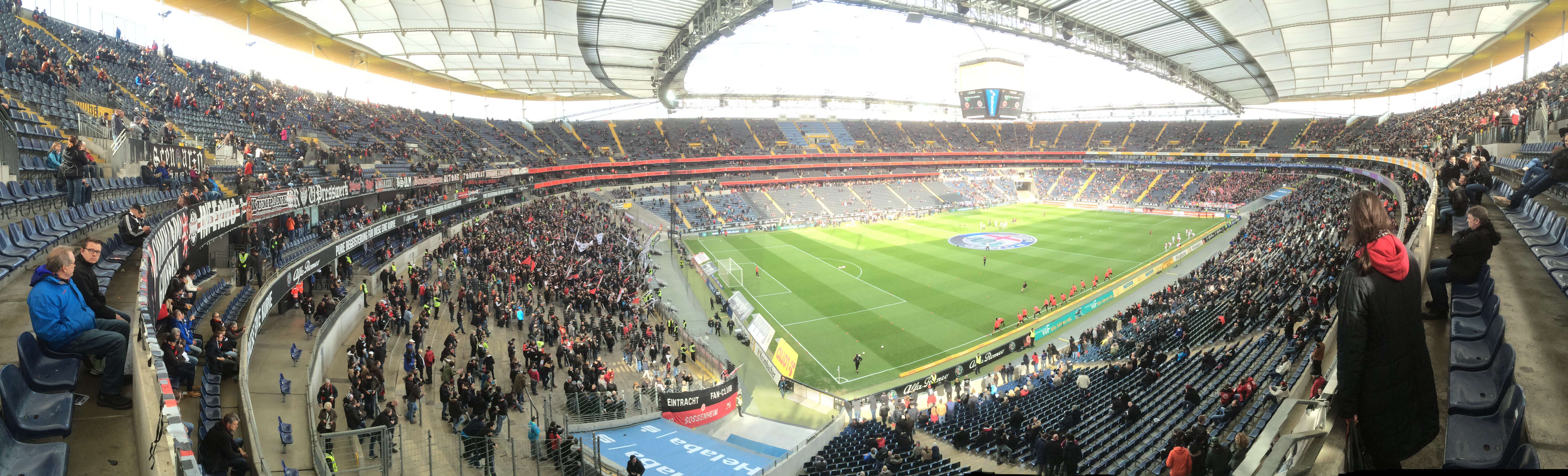 Commerzbank-Arena Panorama